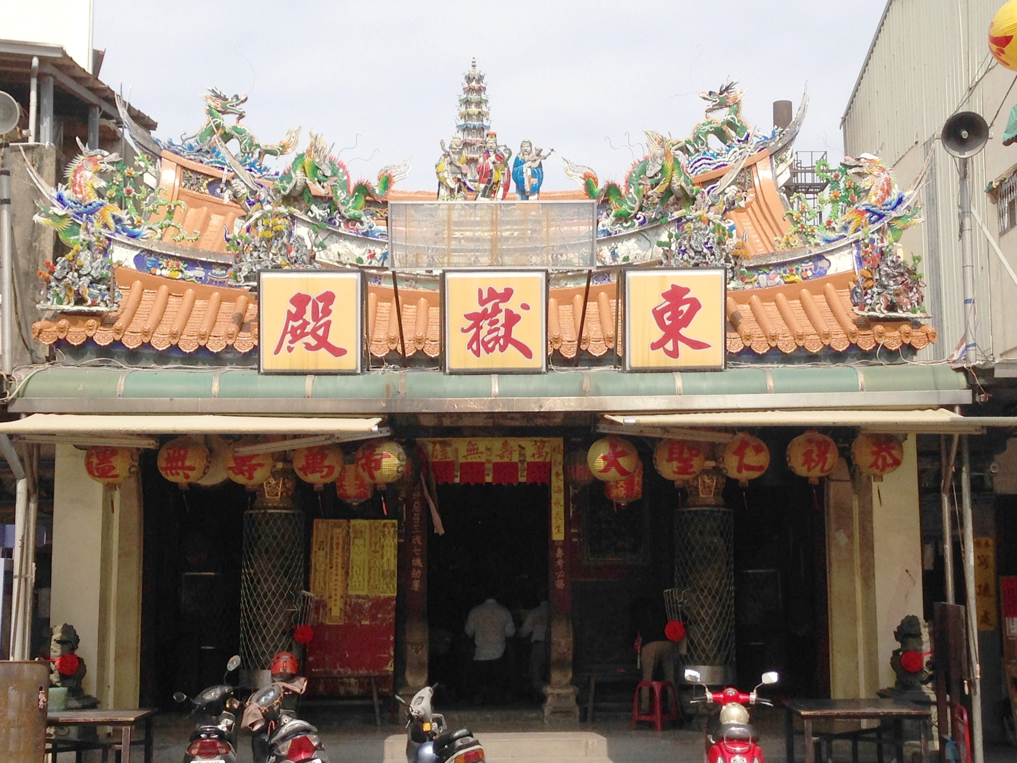 臺南東嶽殿